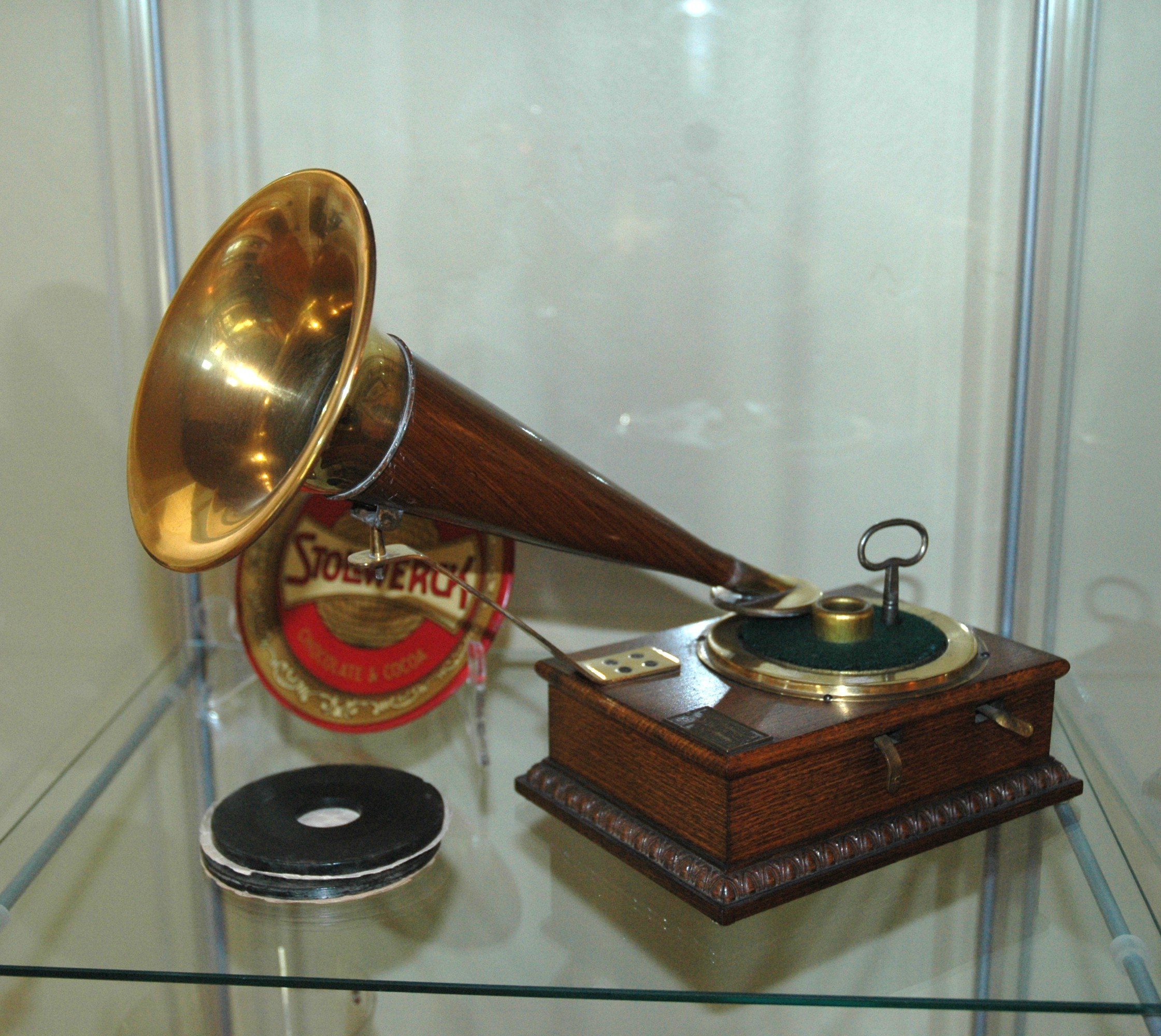 Stollwerck-Phonograf von 1903